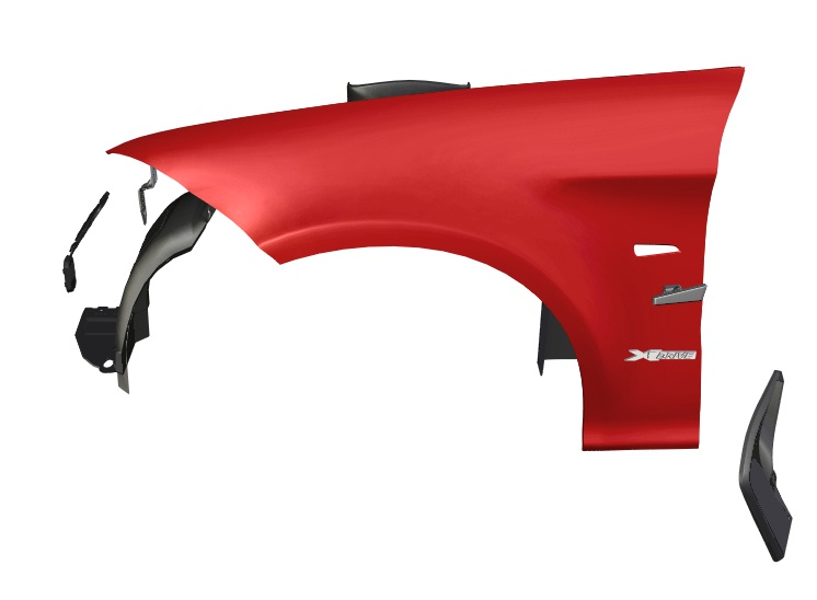 3D модель крыла переднего, левого, BMW 3 серии, 2011 г.в.